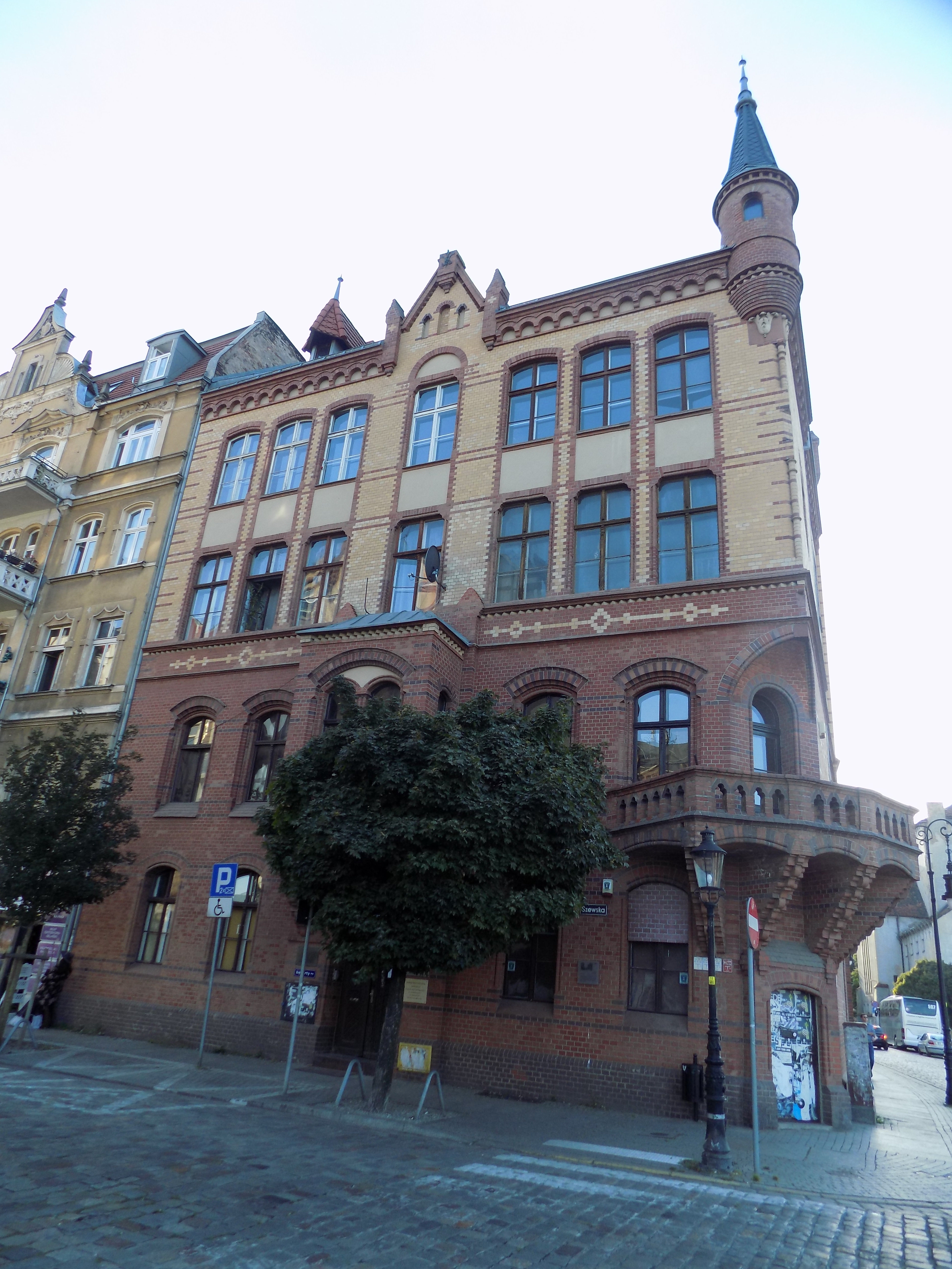 Budynek nr 10 na ulicy Szewskiej w Poznaniu.